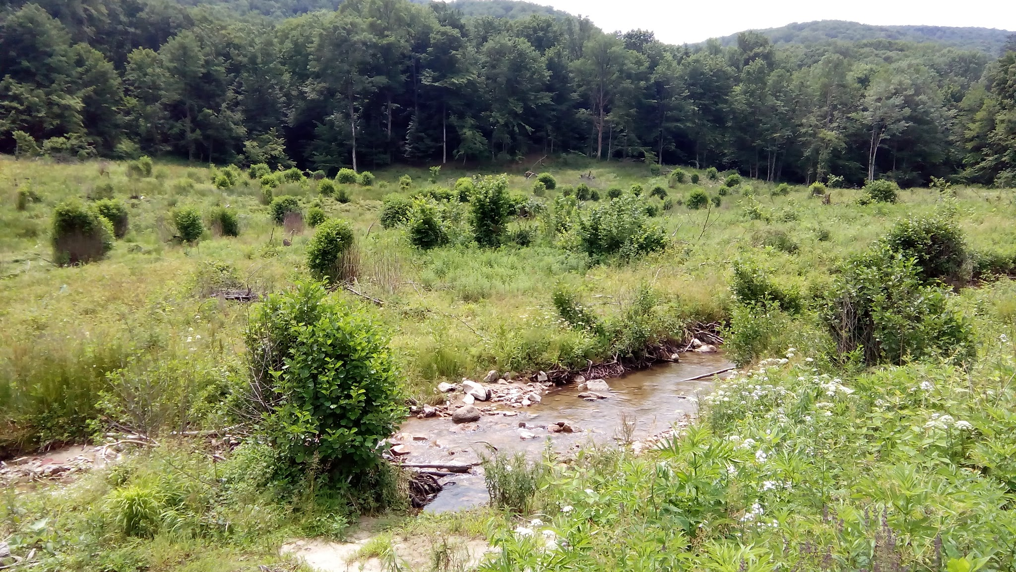 Kuzma, Croatia